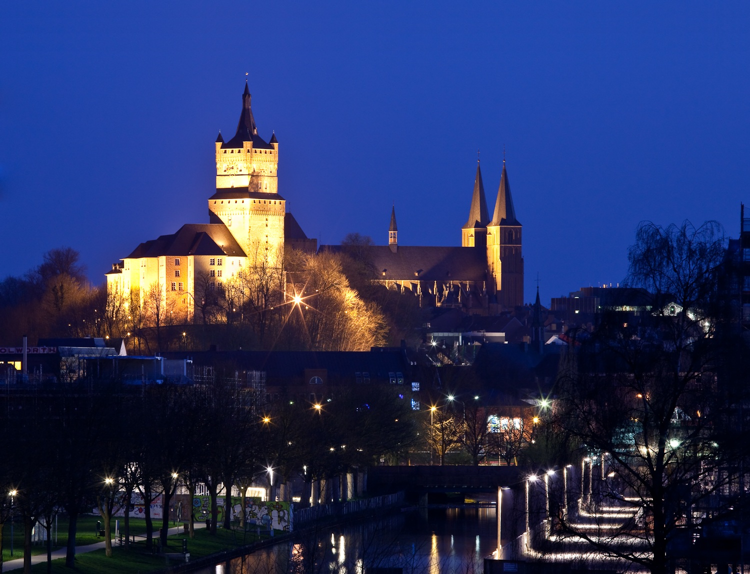 Die Schwanenburg und der Stiftskirche durch die Baustelle der Hochschule fotografiert, die Stiftskirche ist nur am Wochenende Beleuchtet. diese Bauten sind die Wahrzeichen der Stadt Kleve